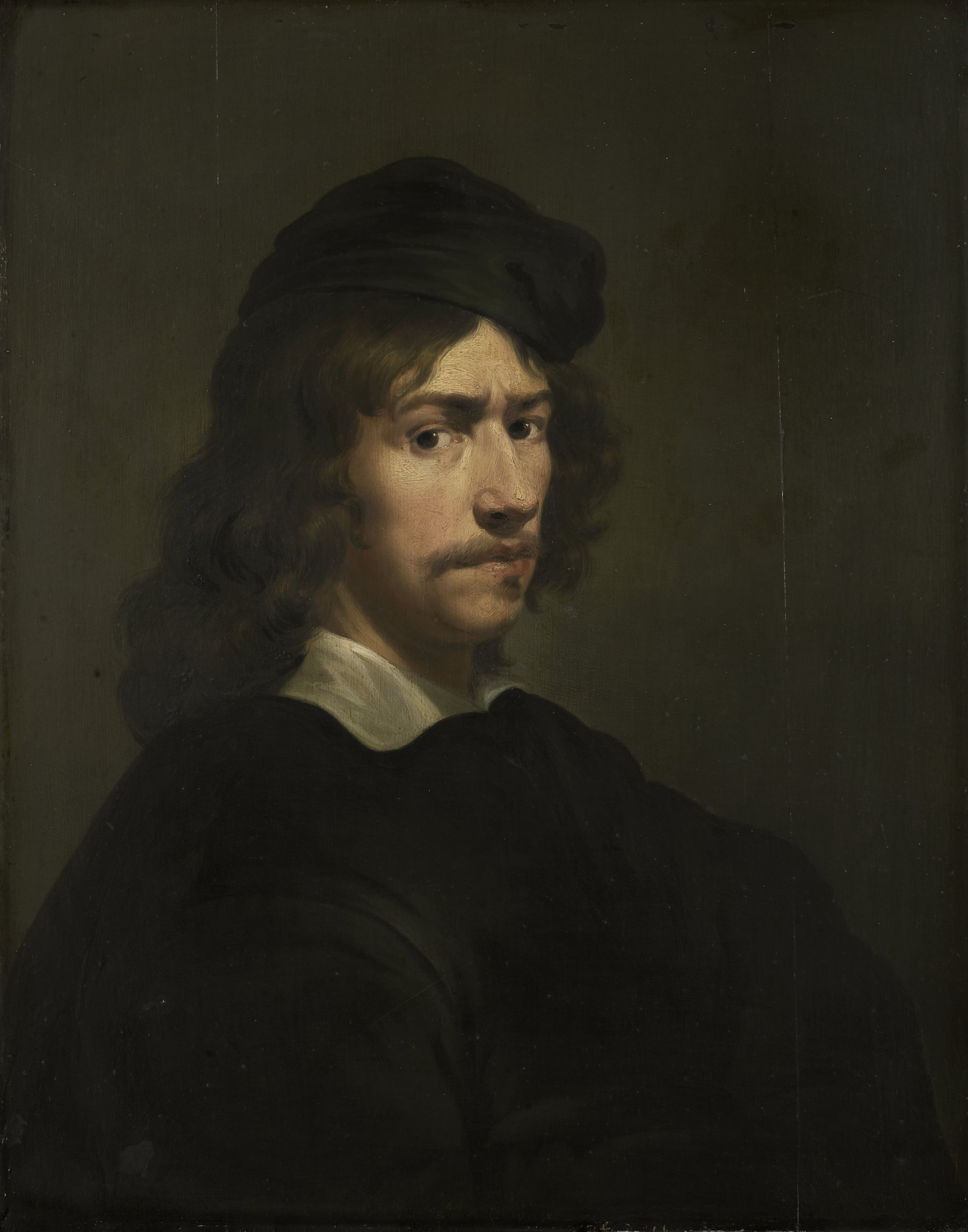 Zelfportret van de schilder Martin Mytens (der Ältere). Buste naar rechts.